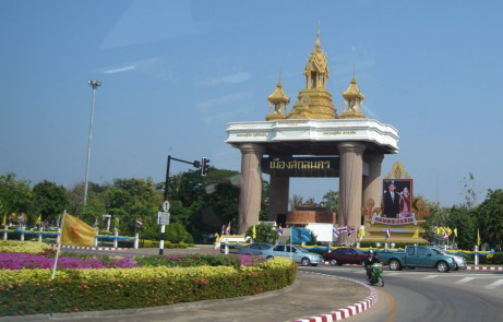 ประตูสัญลักษณ์เมืองสกลนคร. Sakon Nakhon City Gate, Thailand